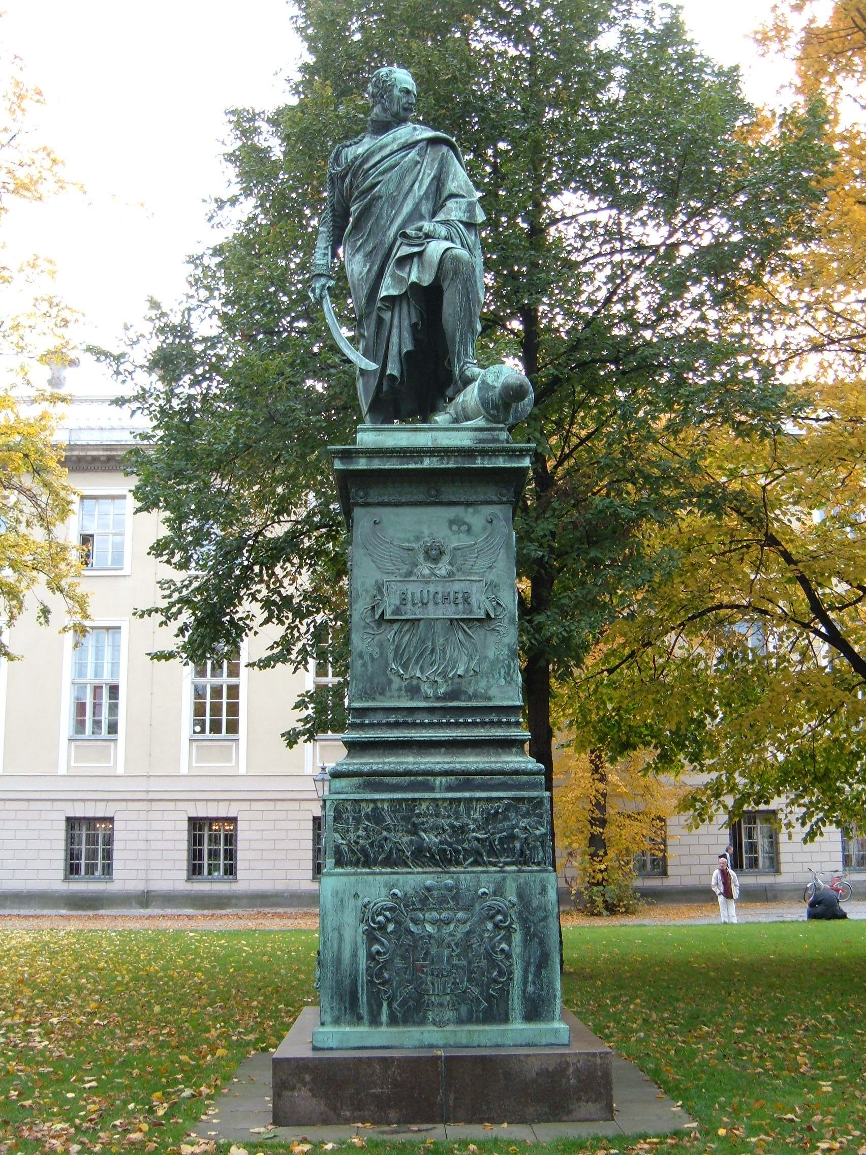 Statue of Gebhard Leberecht von Blücher by Christian Daniel Rauch on the Unter den Linden, Berlin-Mitte, Berlin, Germany.